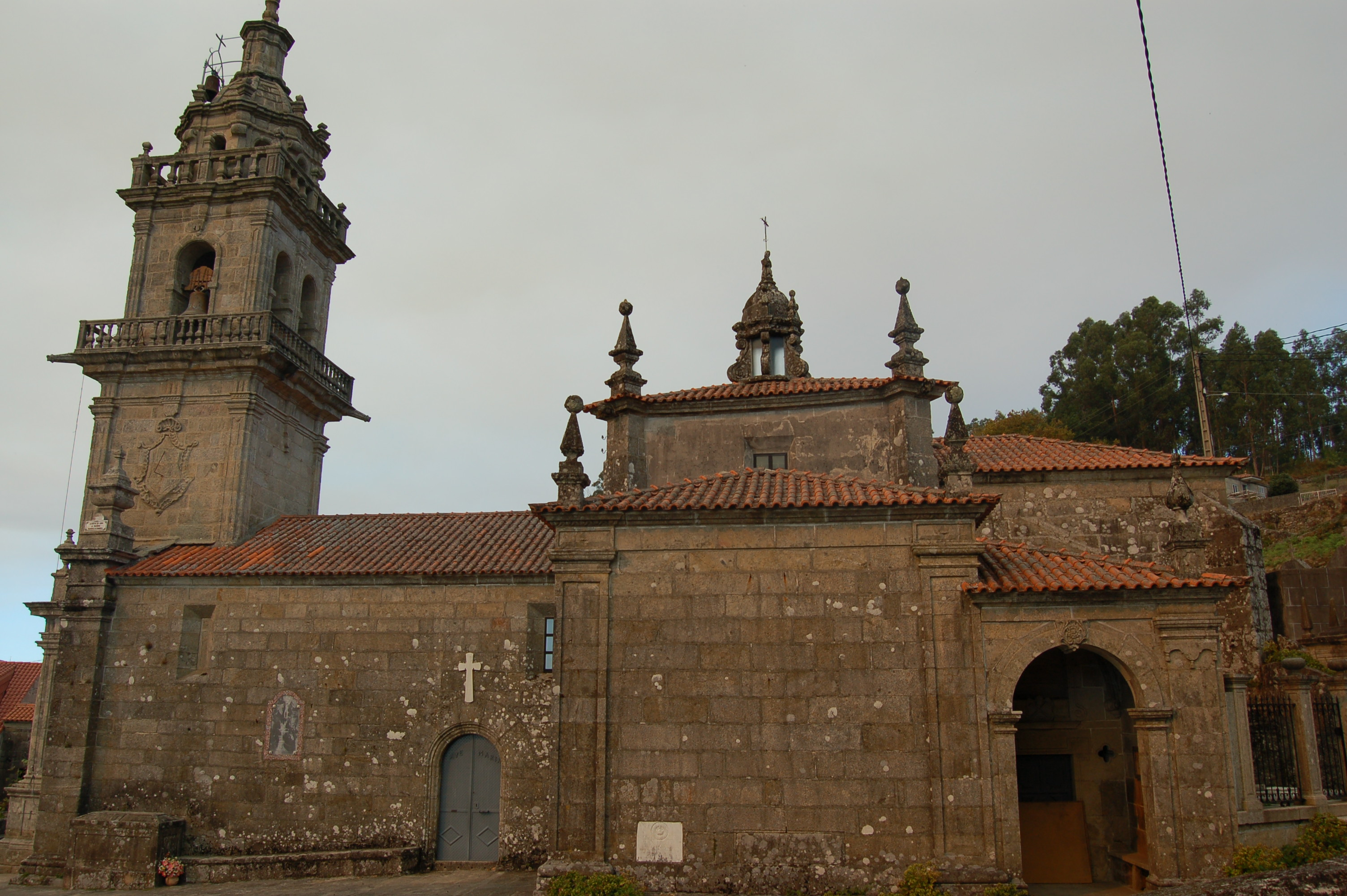 Igrexa parroquial de Santa María de Aguasantas (Cerdedo-Cotobade)